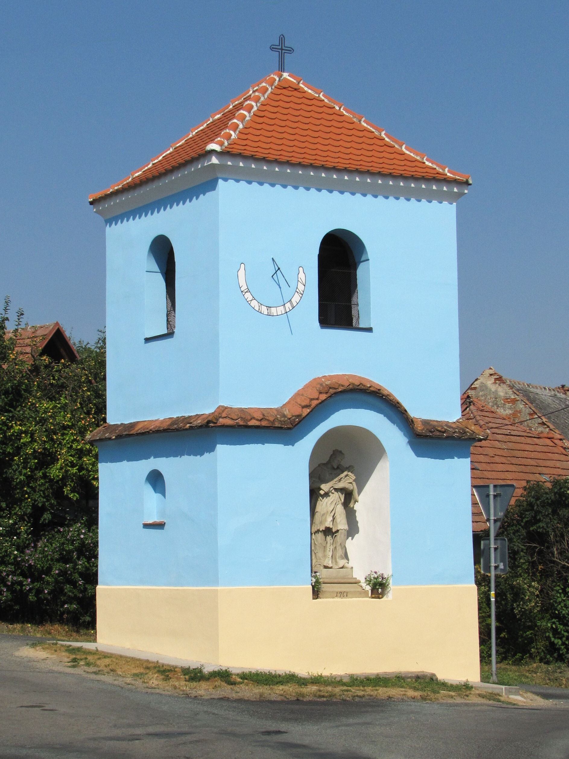 Zvonice z roku 1854 v Čeložnicích